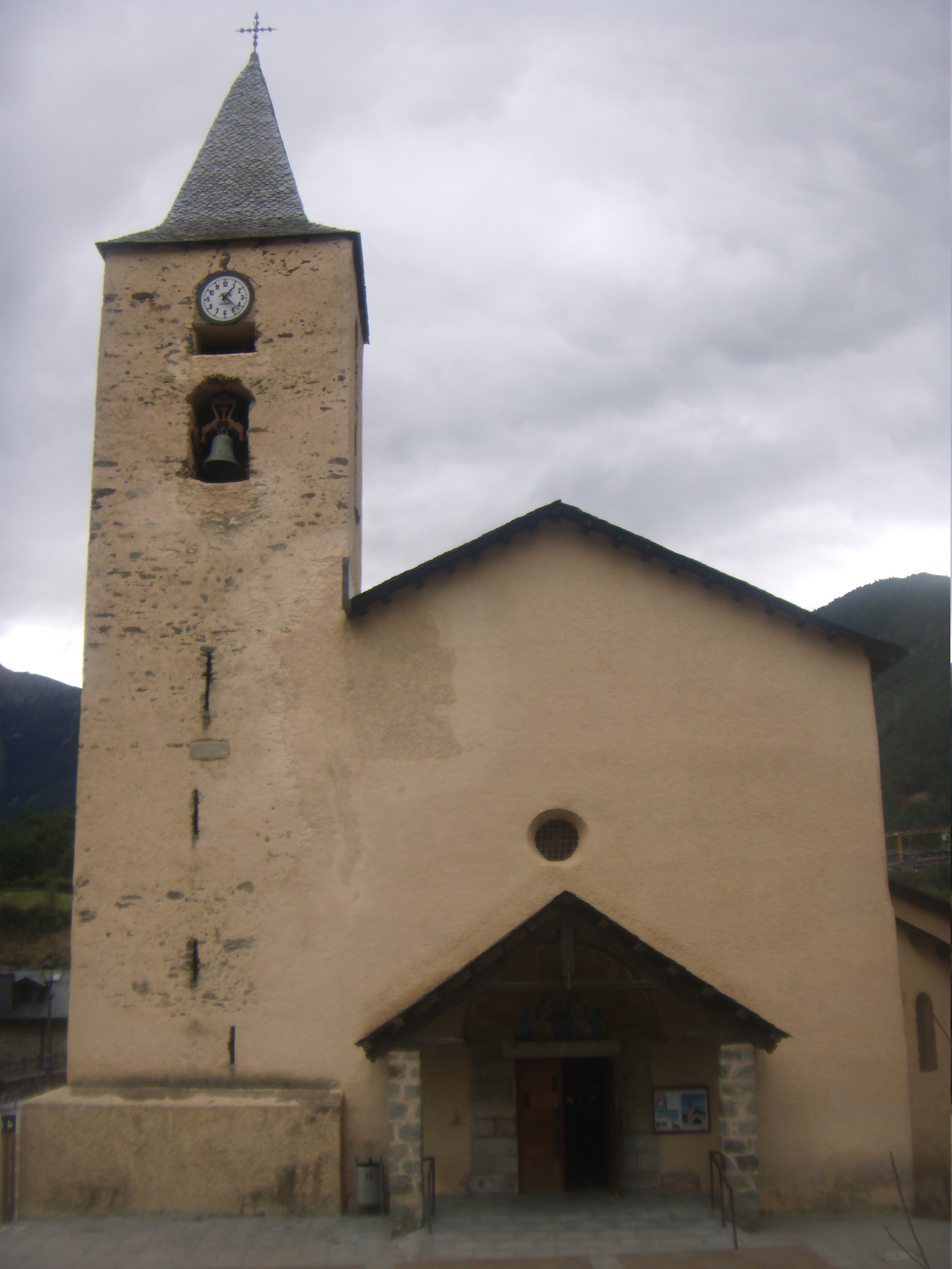 Església de Sant Iscle i Santa Victòria